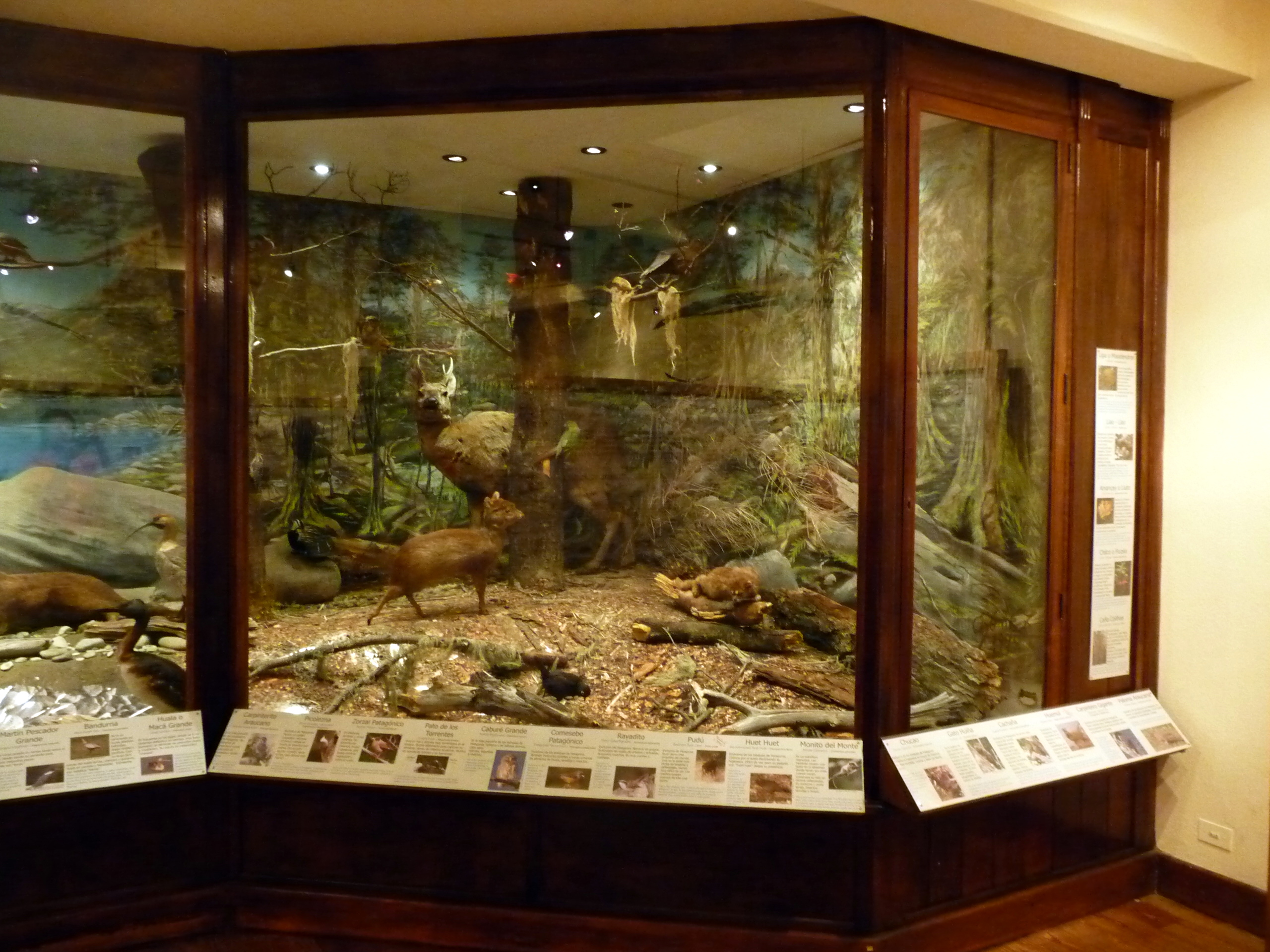 sala del Museo de la Patagonia